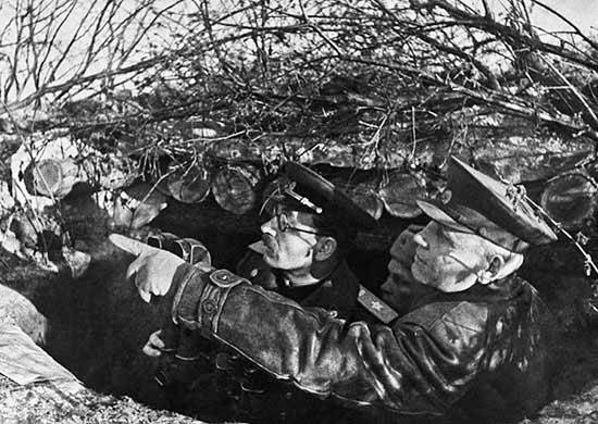 И.С. Конев и П.С. Ротмистров на наблюдательном пункте в ходе Корсунь-Шевченковской наступательной операции. Зима 1944 г.